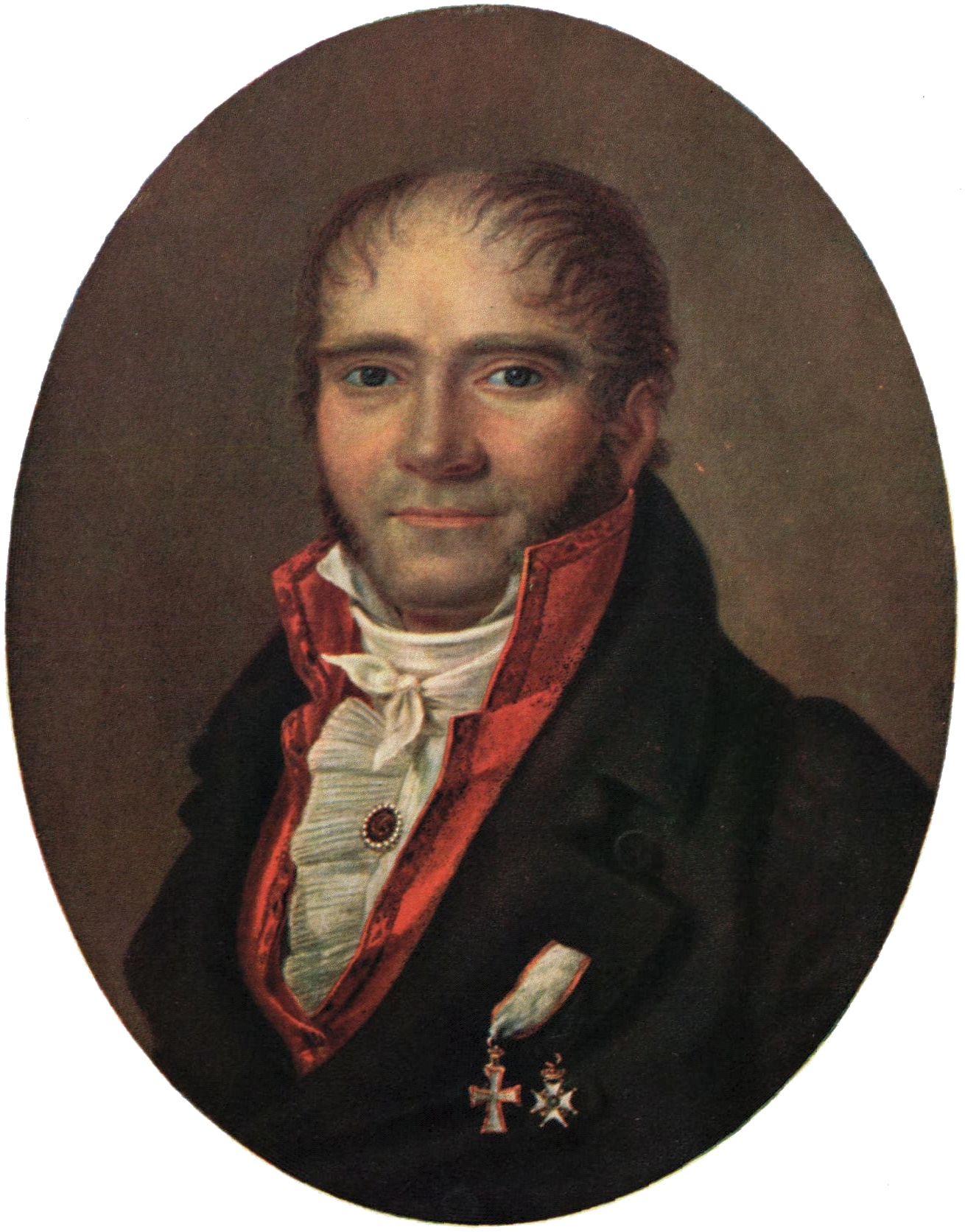 Norwegian: Statsråd Niels Aall.